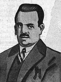 Presidente del Sindicato Libre